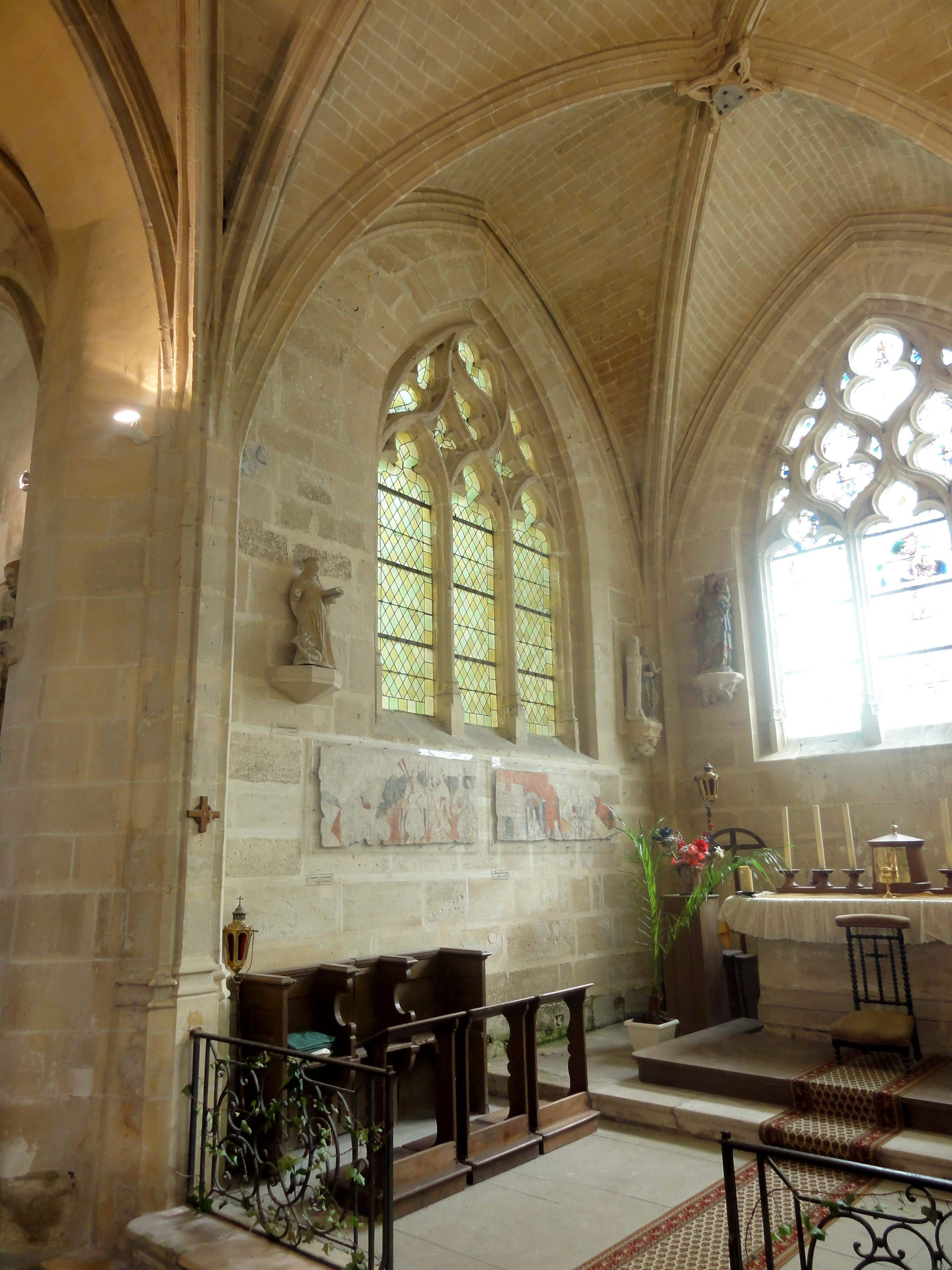 Croisée, vue vers le nord-est.